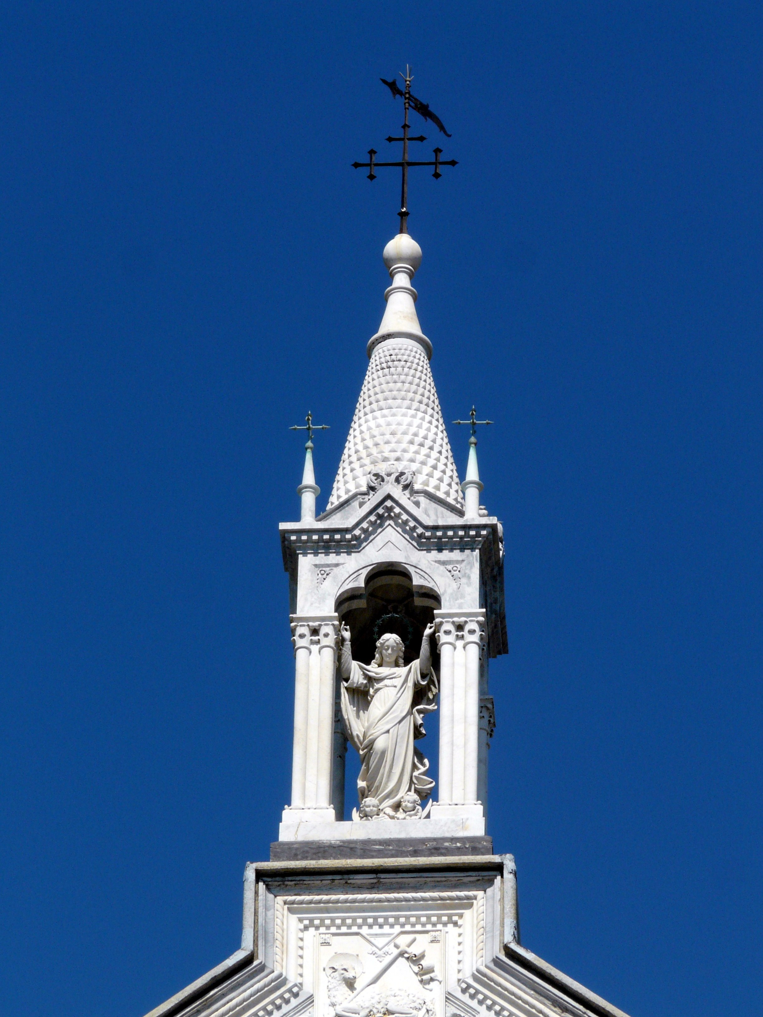 Serie di immagini esterne del santuario di Nostra Signora di Montallegro, Rapallo, Liguria, Italia